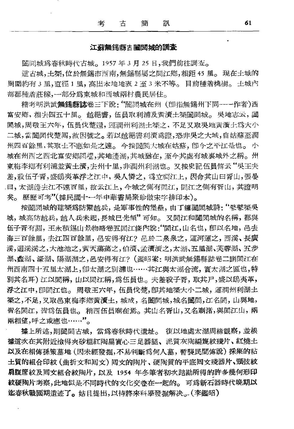 江蘇省文物工作大隊出具的無錫闔閭城遺址考古調查報告，1958年